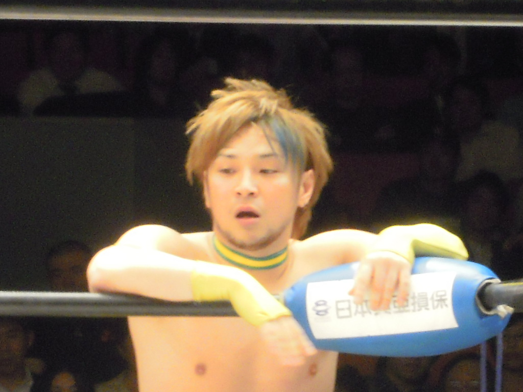 ヘラクレス千賀 2010年5月28日 大日本プロレス後楽園ホール大会 投稿者撮影